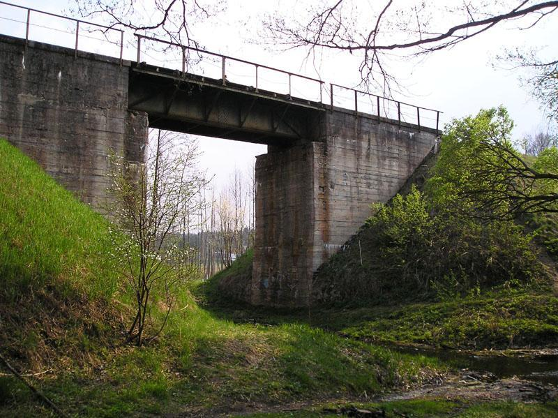 Most kolejowy na linii PKP na trasie Białystok – Zubki Białostockie na rzece Świnobródka w Sokolem. Most podczas II wojny światowej został zbombardowany, a odbudowany po wojnie.